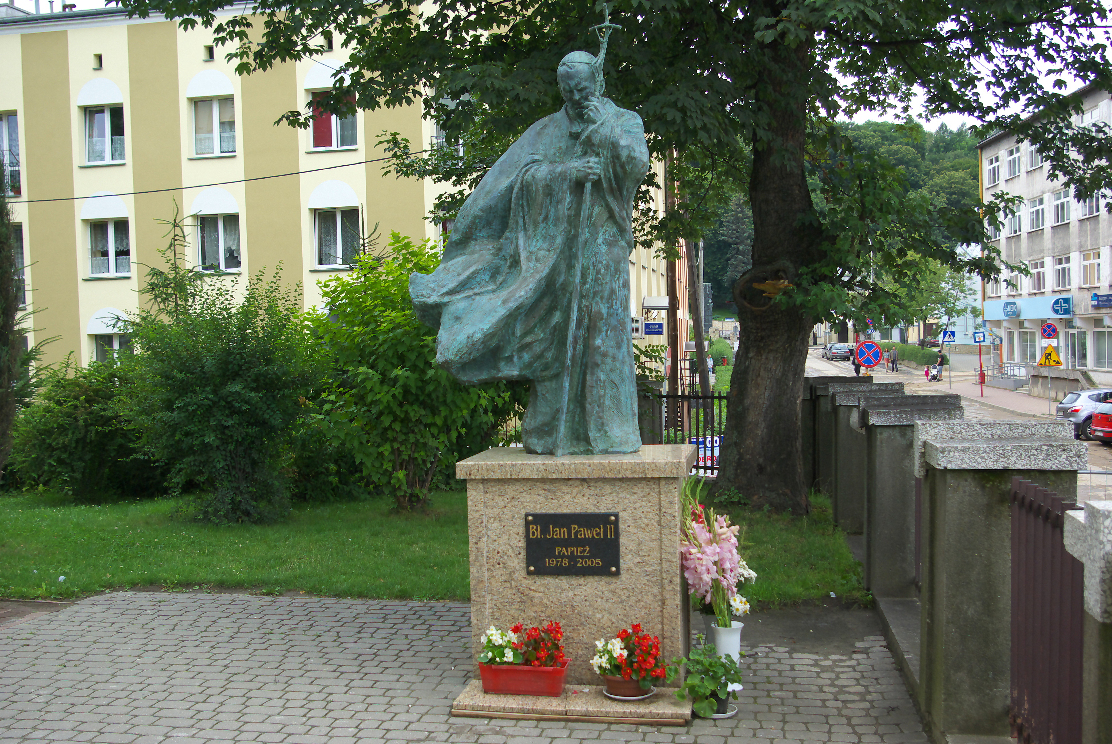 Pomnik Jana Pawła II w Sanoku